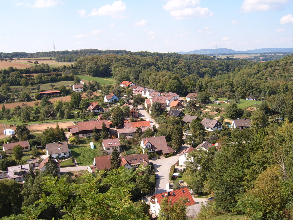 Talhausen - Blick auf Bergweg